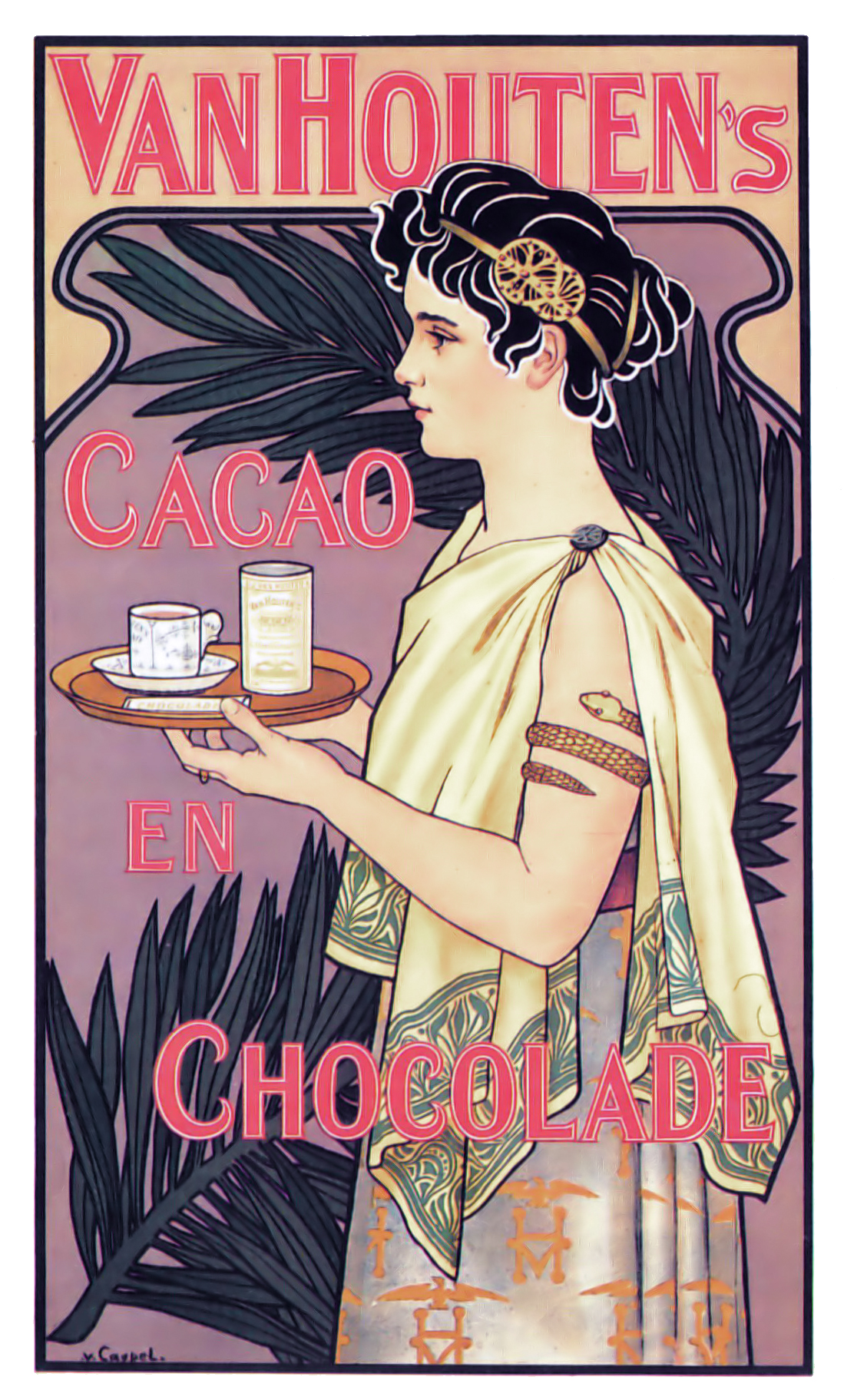 Affiche - Van Houten's Cacao en Chocolade 1899